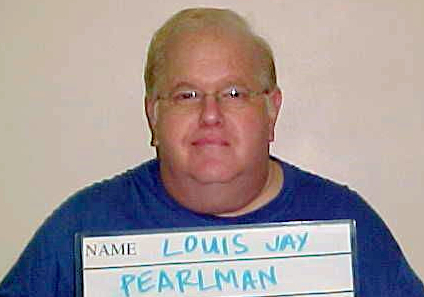 Lou Pearlman en prisión por fraude